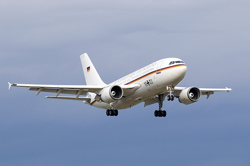 Airbus A310-304 VIP 10+22 „Theodor Heuss“ der Flugbereitschaft Bundesministerium der Verteidigung (Deutschland)